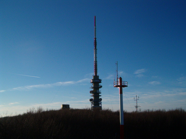 Kékes. Saját készítésű kép, 2005 januárban. A képet a meteorológiai állomás tetejéről fotóztam. Erbeszkorn Tamás